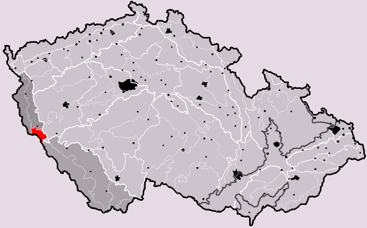 Poloha geomorfologického celku Všerubská vrchovina v rámci České republiky. Hercynský systém Hercynská pohoří I Česká vysočina I1 (I) Šumavská subprovincie I1A (IA) Českoleská oblast I1A-3 (IA-3) Všerubská vrchovina